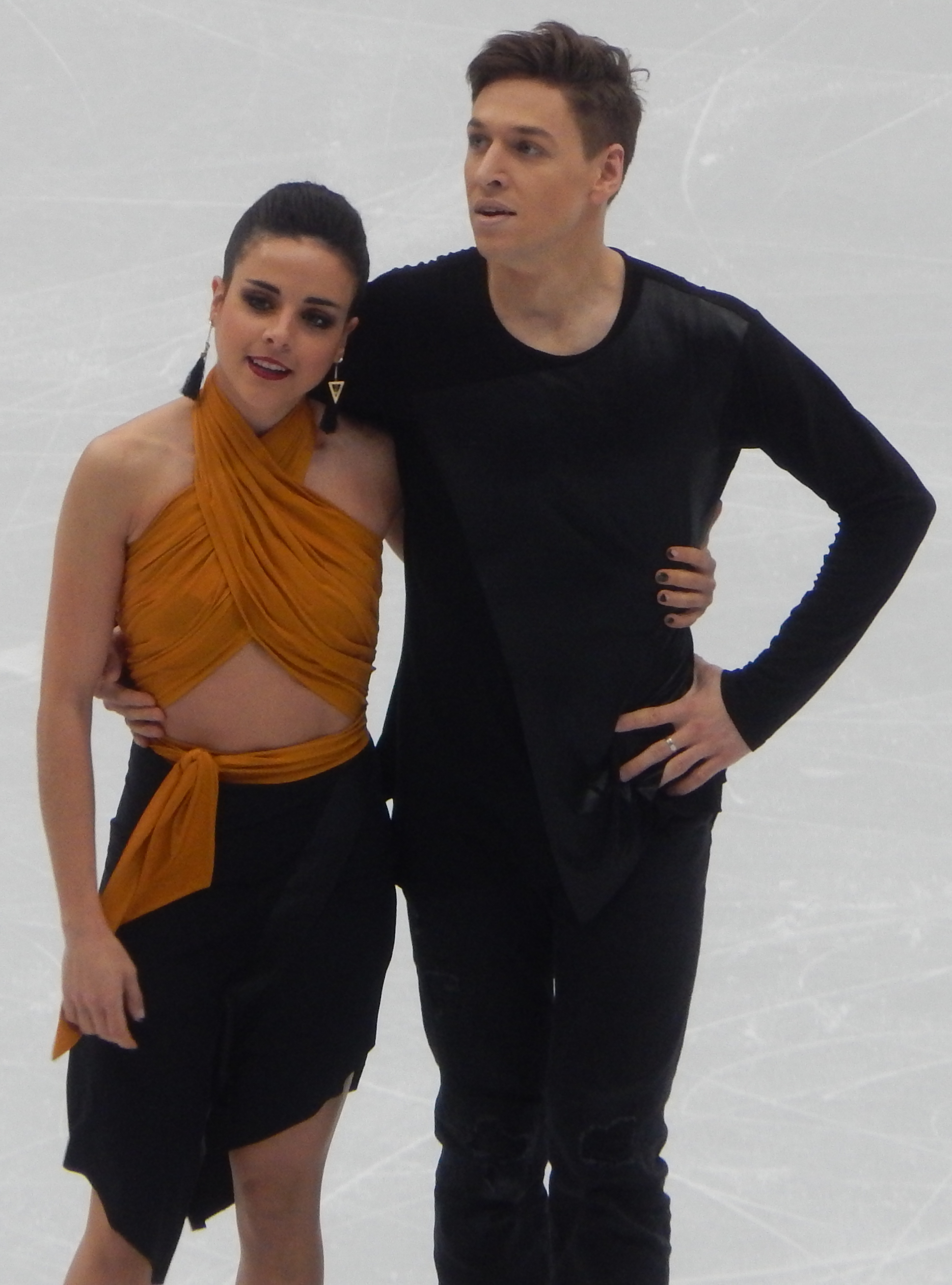 Чемпионат Европы по фигурному катанию 2018 в Москве. Третий день соревнований (19 января). Танцевальная пара из Испании Сара Уртадо и Кирилл Халявин